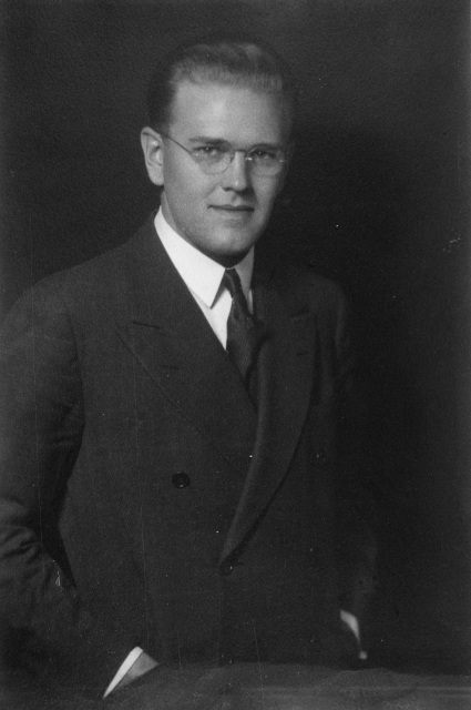 MuuseumikoguFotokoguOlemusfotoSäilivusmääramata legend Fk 2731:1 - 1336 Eesti Vabariigi suursaadik Ameerika Ühendriikides ja ÜRO-s Ernst Jaaksoni (1905 - 1998) isiklik fotokogu, saadud tema kogust (New York 10708 Bronxville 900 Palmer Road) peale surma 1999 aastal. v.v. akt 2000:24 + esemed k/r 506 New York Fotograaf teadmata, detsember 1937 kommentaar Fk 2731:1 - 1336 Eesti Vabariigi suursaadik Ameerika Ühendriikides ja ÜRO-s Ernst Jaaksoni (1905 - 1998) isiklik fotokogu, saadud tema kogust (New York 10708 Bronxville 900 Palmer Road) peale surma 1999 aastal. v.v. akt 2000:24 + esemed k/r 506 Fotograaf teadmata